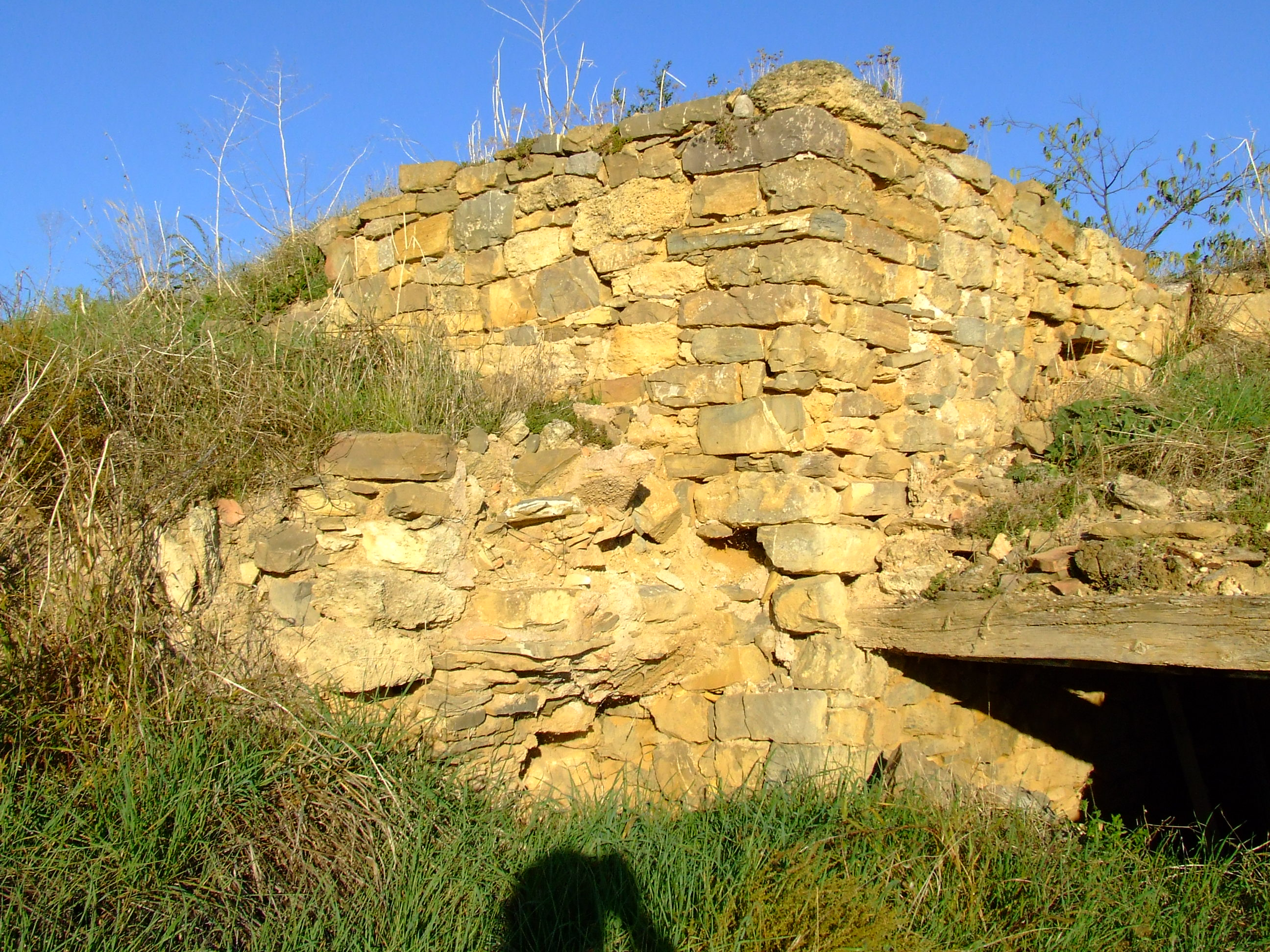 Restes del castell de Basturs (Orcau, Isona i Conca Dellà, Pallars Jussà)